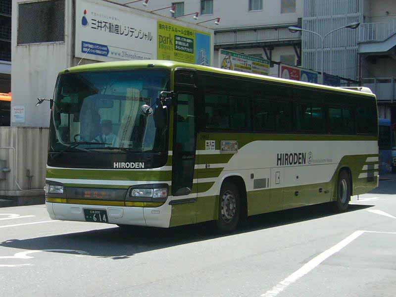 登録番号 広島200か・614 広島電鉄所属 新広益線用 2007年6月16日 広島バスセンターにて撮影